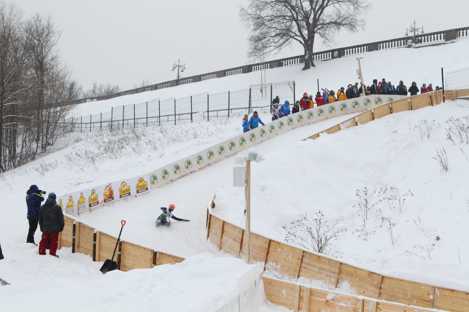 Трасса по натурбану на Воробьевых горах, 2016, Москва